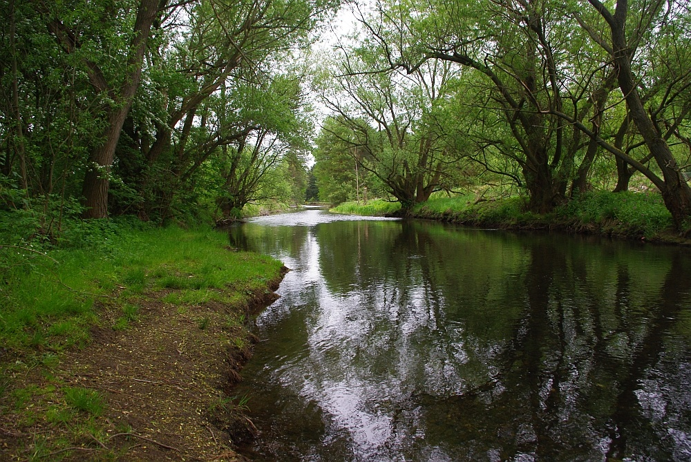 Naturschutzgebiet Mittleres Innerstetal mit Kanstein vor Kunigunde, Innerste 1, NSG BR 131, FFH 121